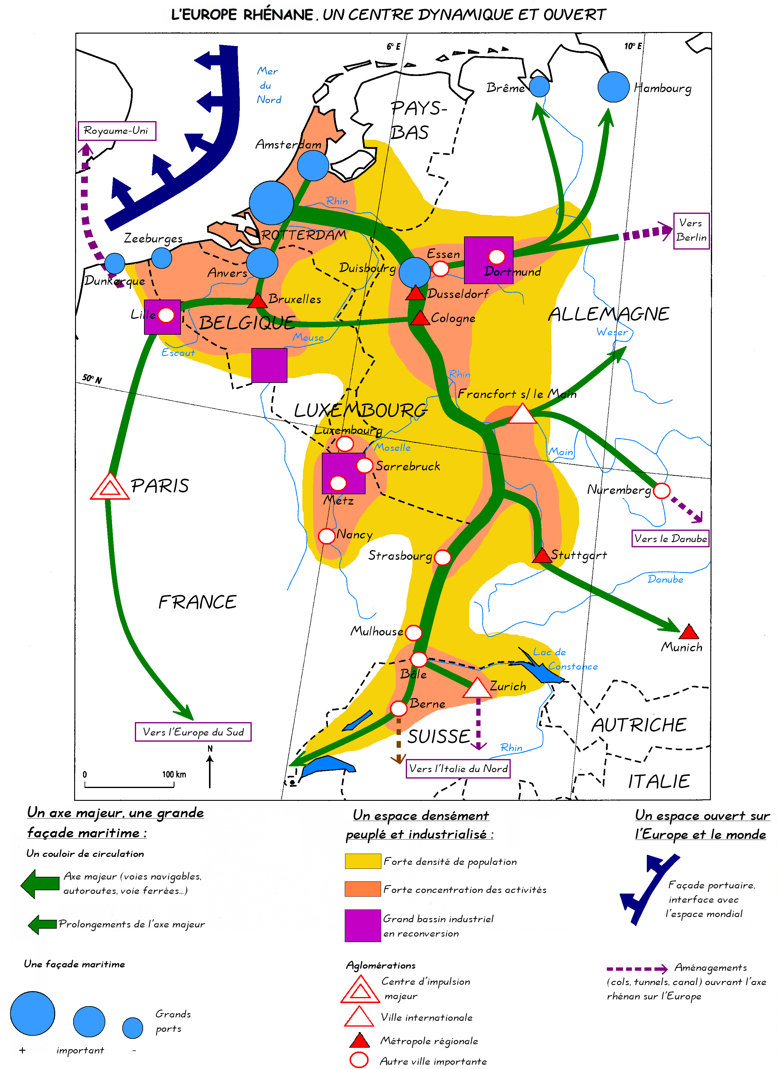 L'Europe rhénane, un centre dynamique & ouvert. Carte inspirée du livre de géographie L'Espace mondial sorti chez Magnard en 2004.